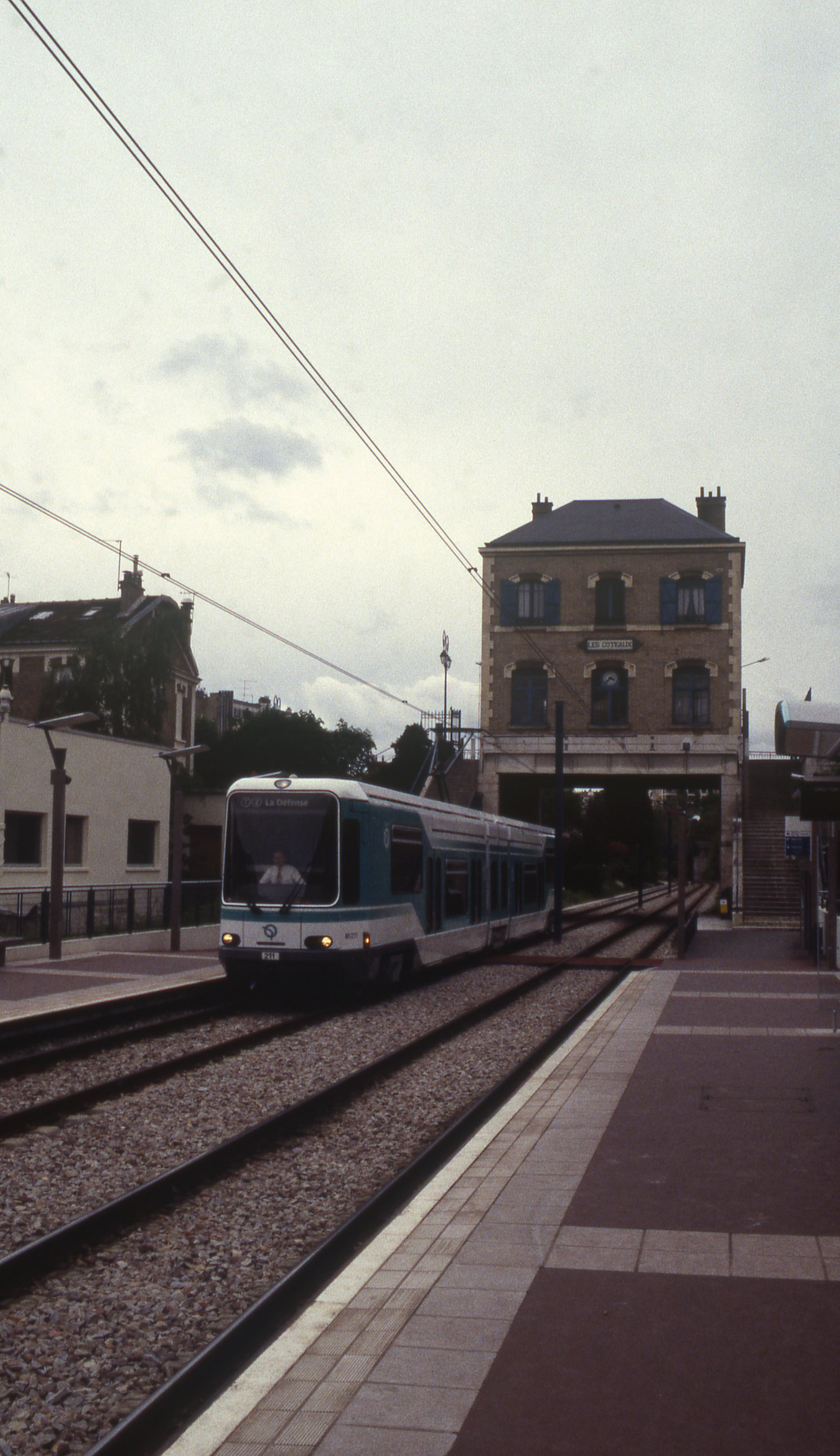 Tramlijn 2 bij de halte Les Coteaux